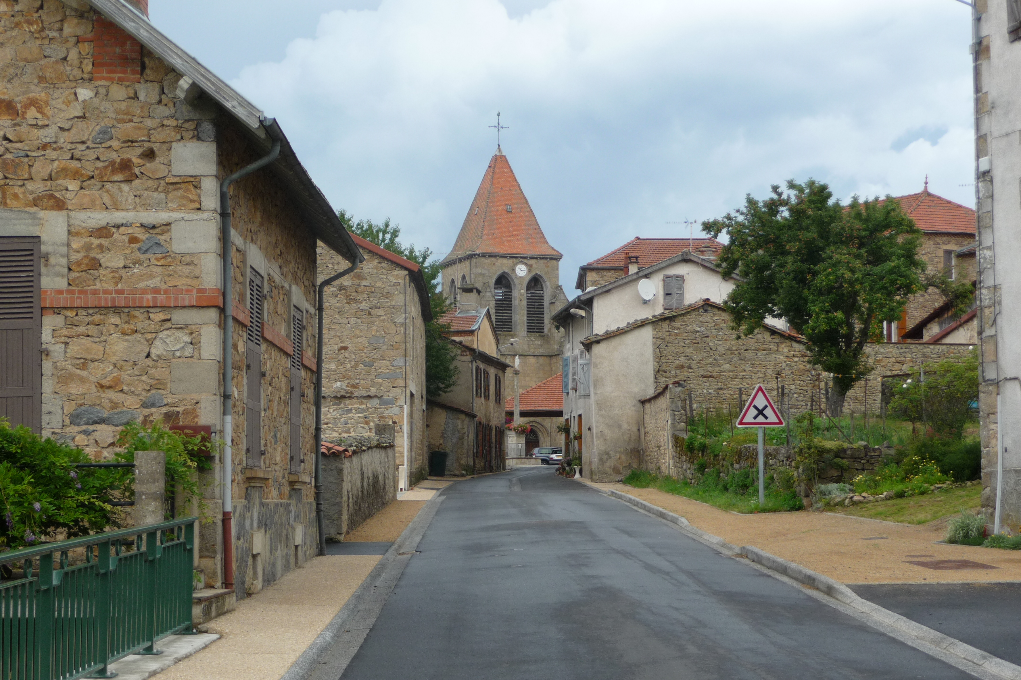 Rue de Bertignat.